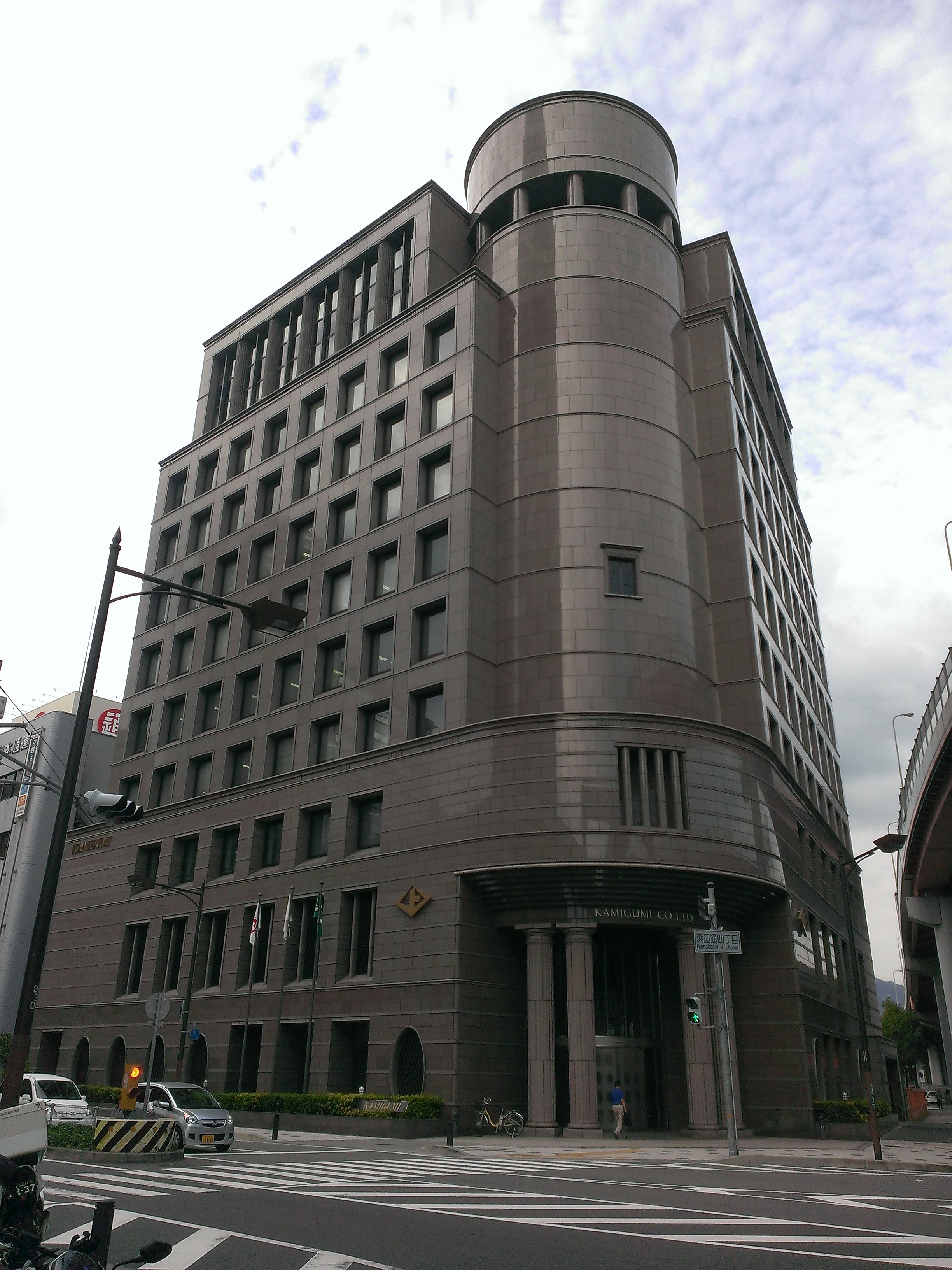 上組本社（神戸市中央区）